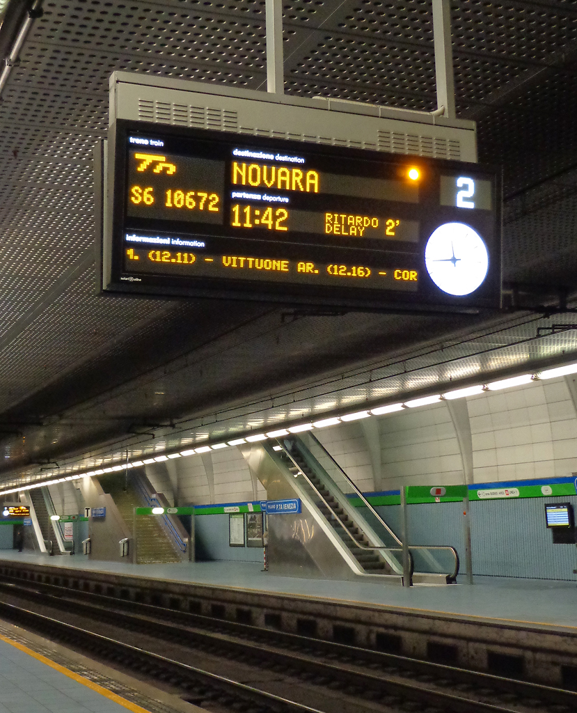 Stazione ferroviaria di Milano Porta Venezia, teleindicatore.